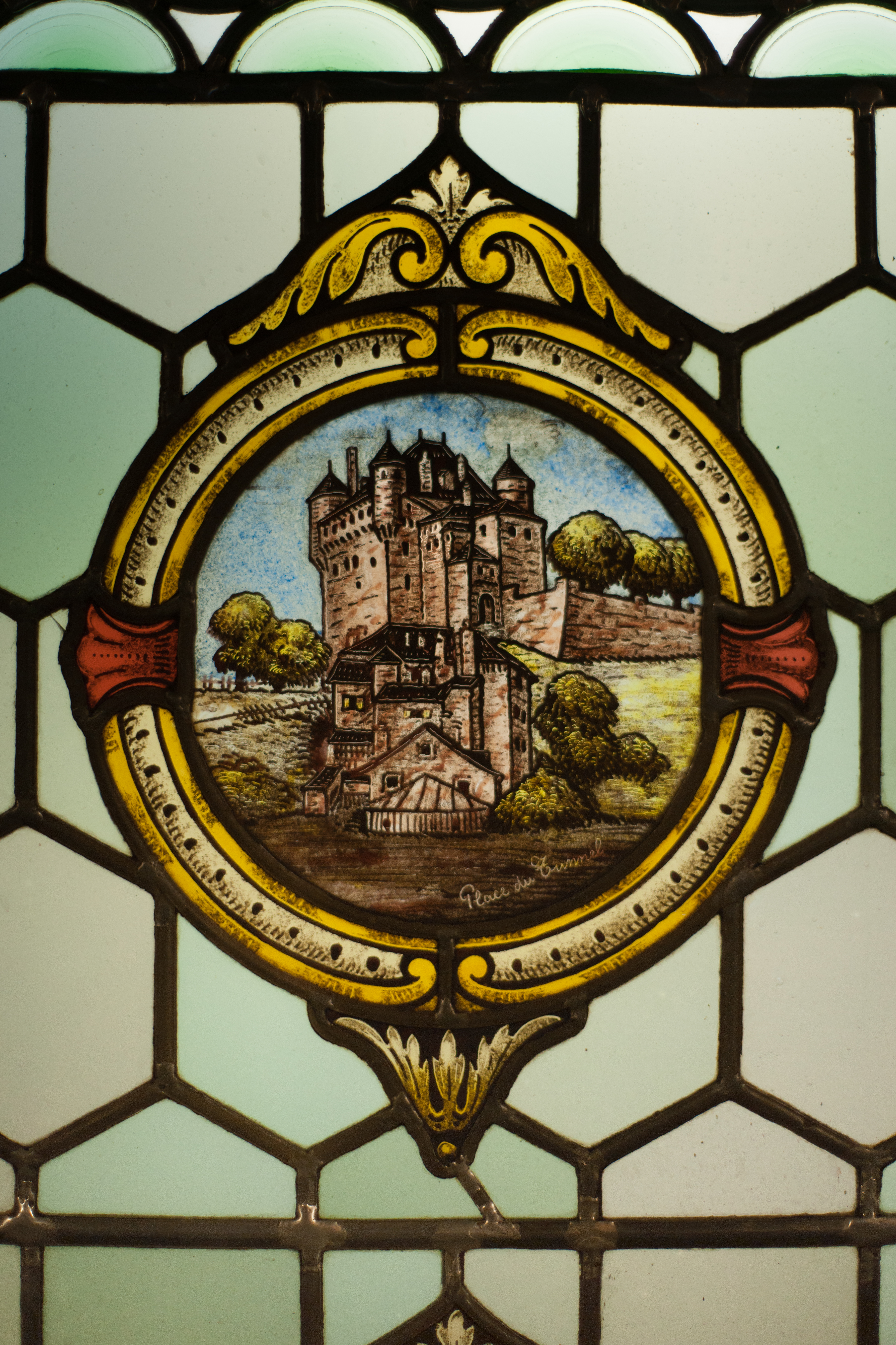 Pinte Besson - vitraux du fond (haut)